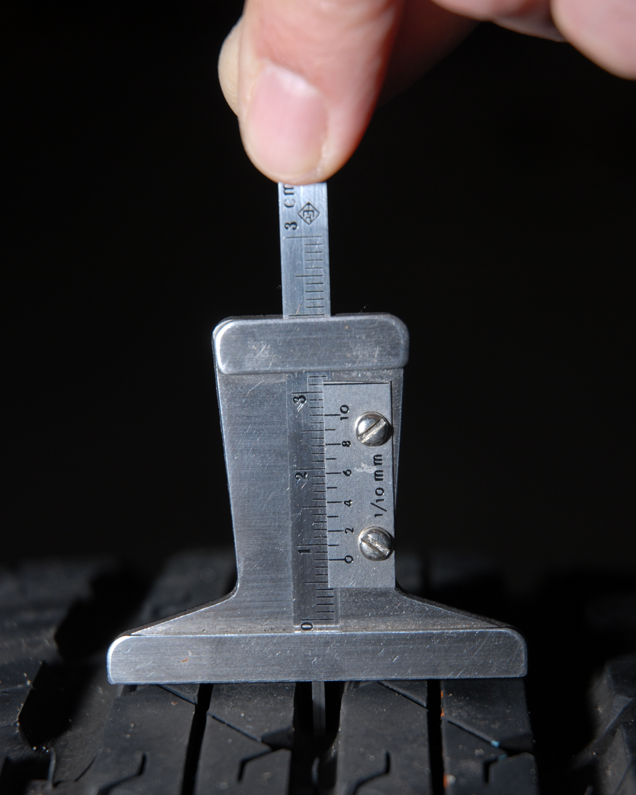 analoges Profiltiefenmessgerät aus Metall